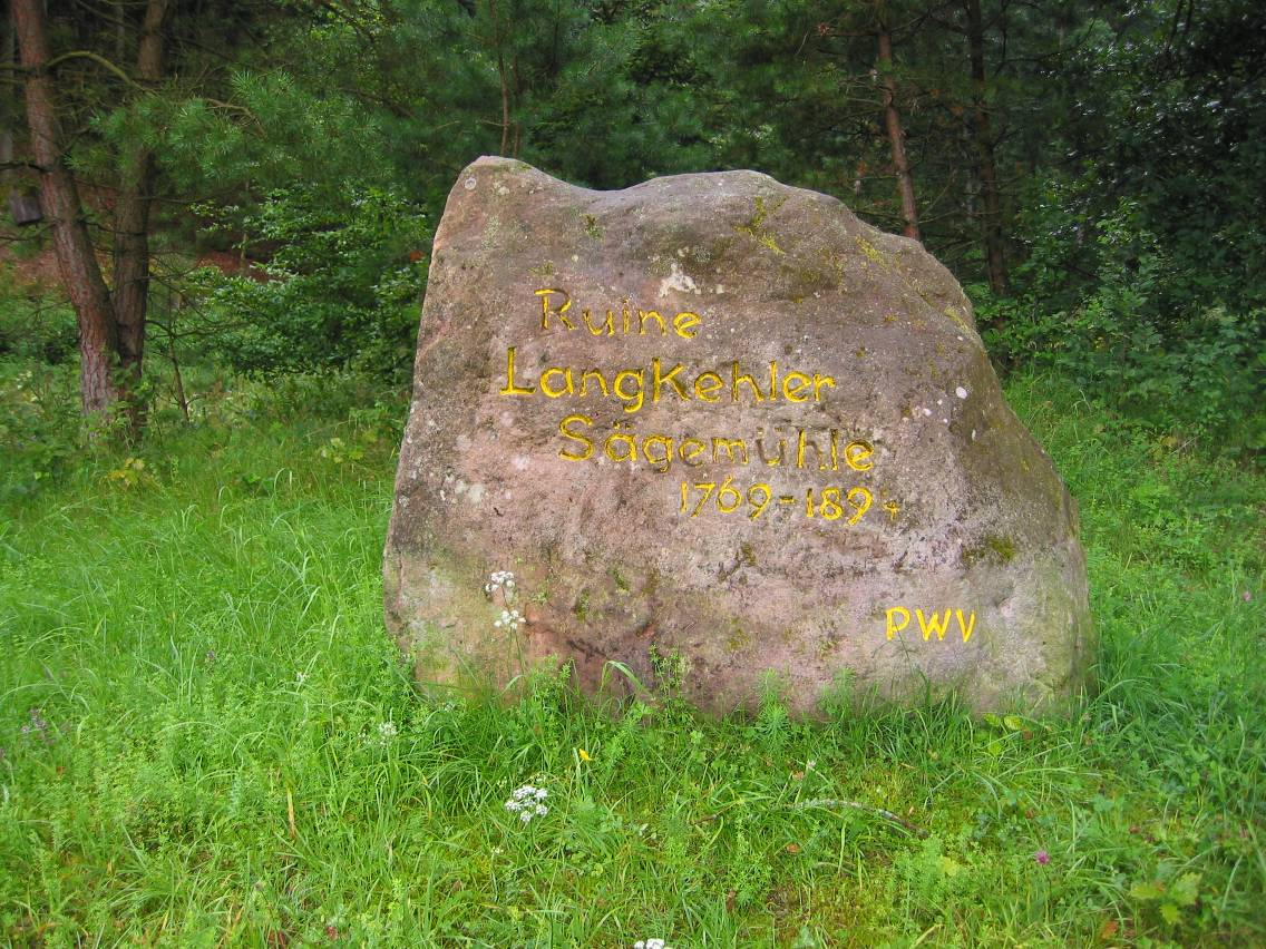 Ritterstein Nummer 306, Ruine Langkehler Sägemühle 1769 - 1894